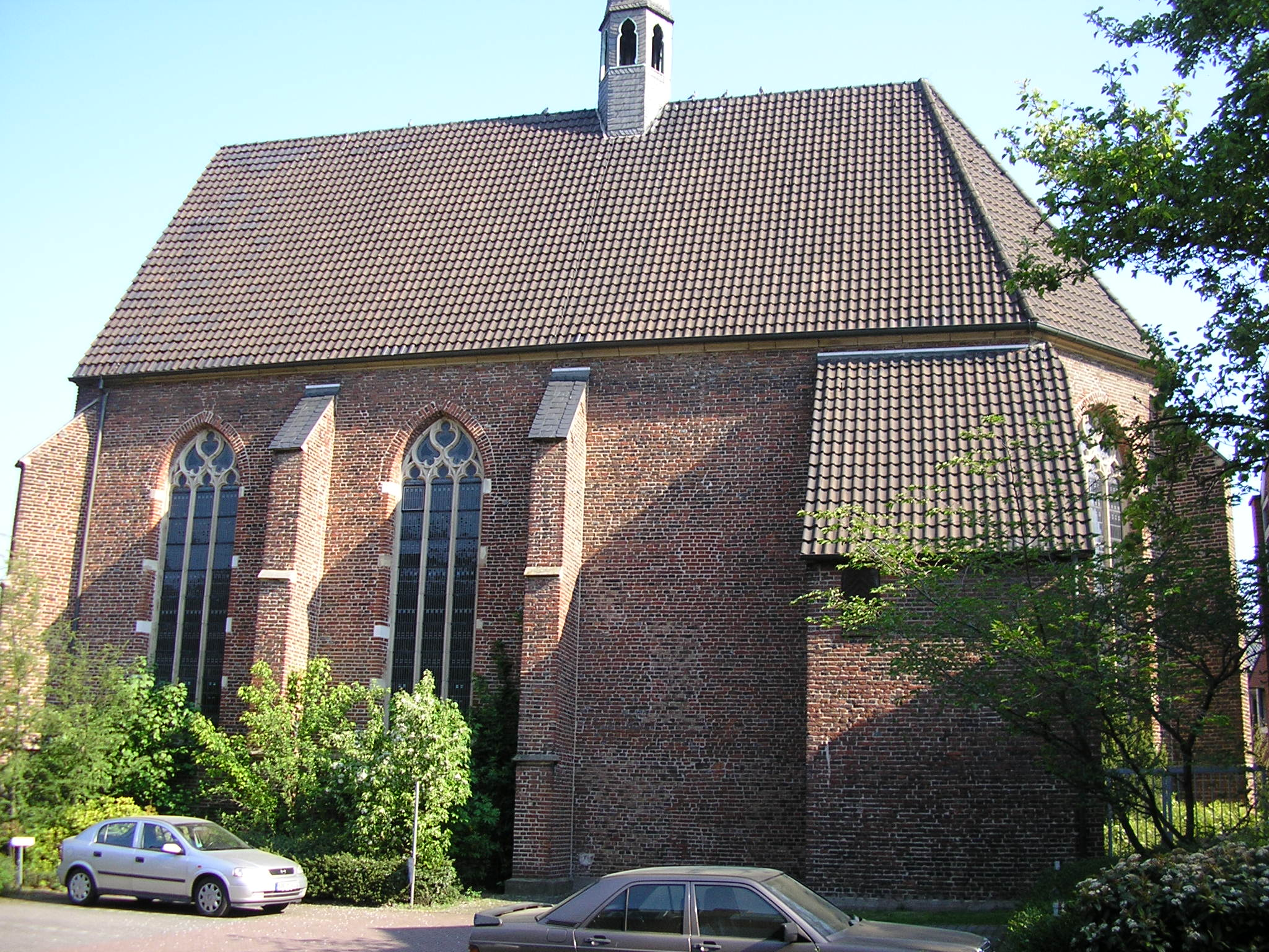 spätgotische Agneskapelle zu Bocholt